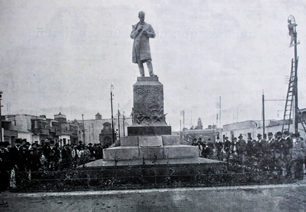 Inauguración del monumento a Antonio Raimondi (1910), ubicado en la plaza Italia, antiguamente denominada plaza de Santa Ana.